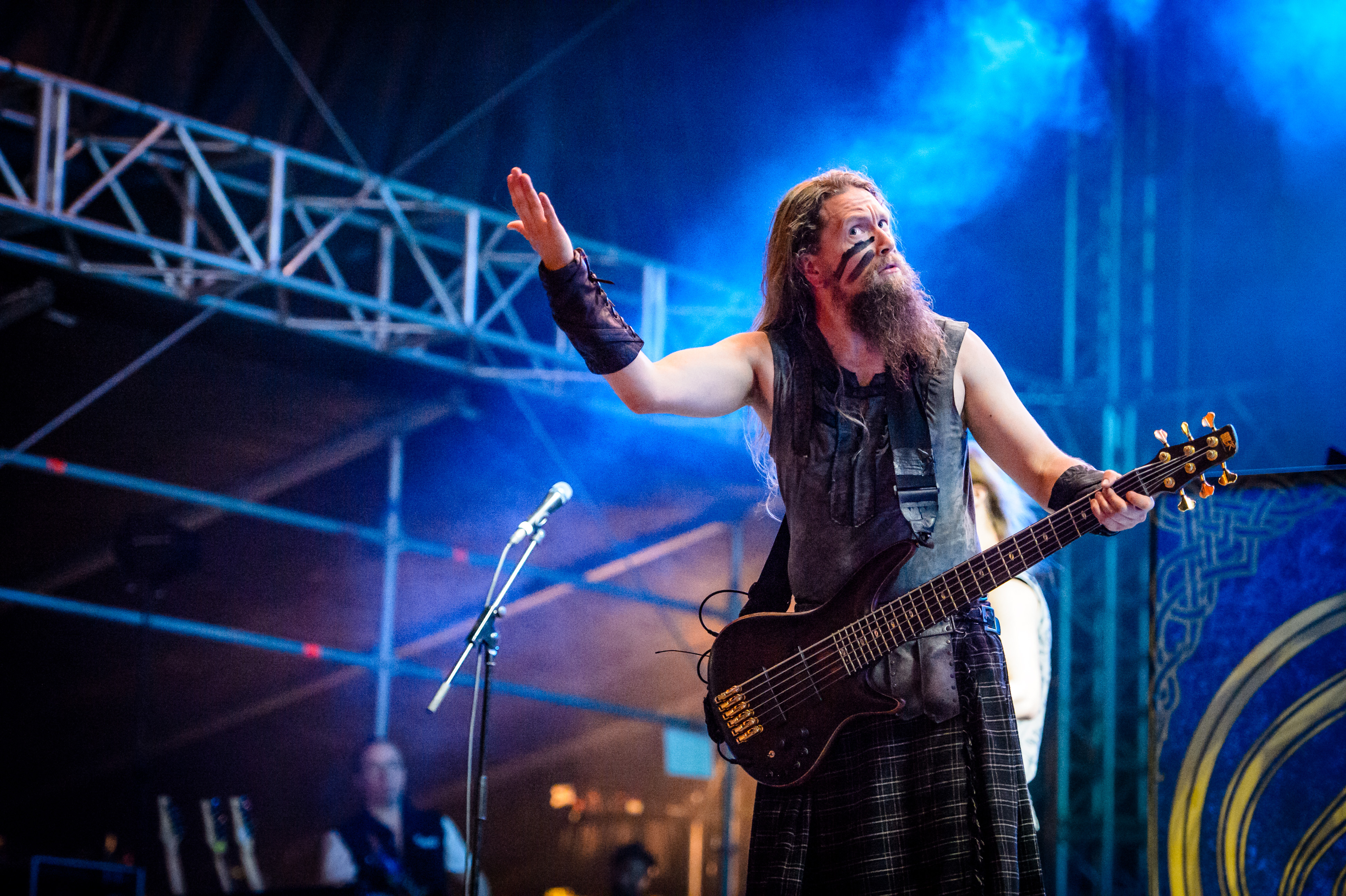 'Summer Breeze Festival 2017; Dinkelsbühl': 'Ensiferum'